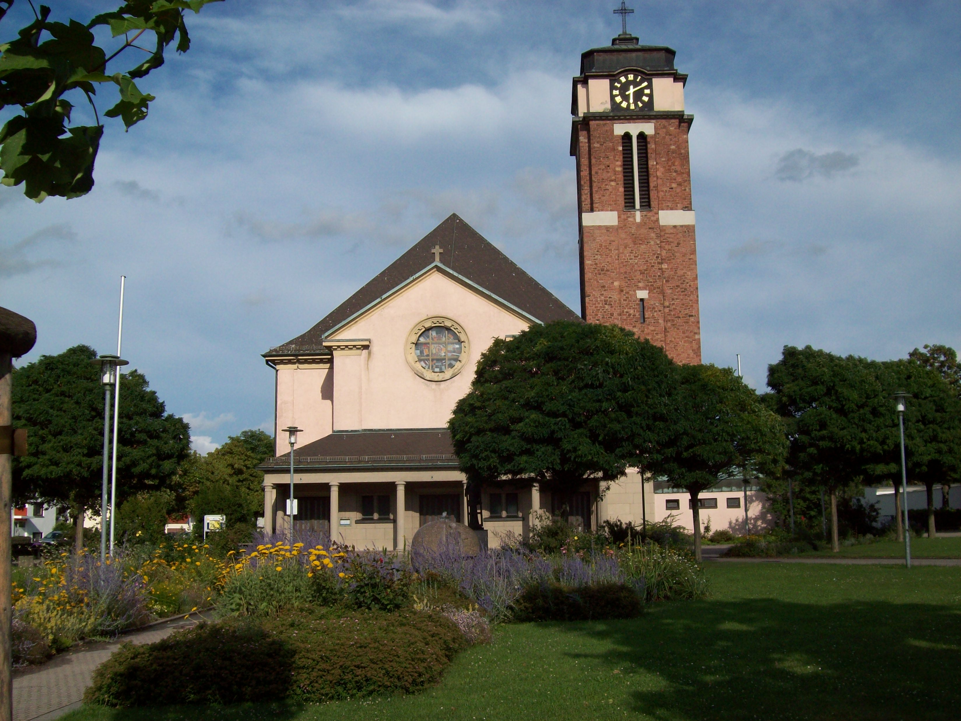 St. Laurentius, Aschaffenburg-Leider, erbaut 1921